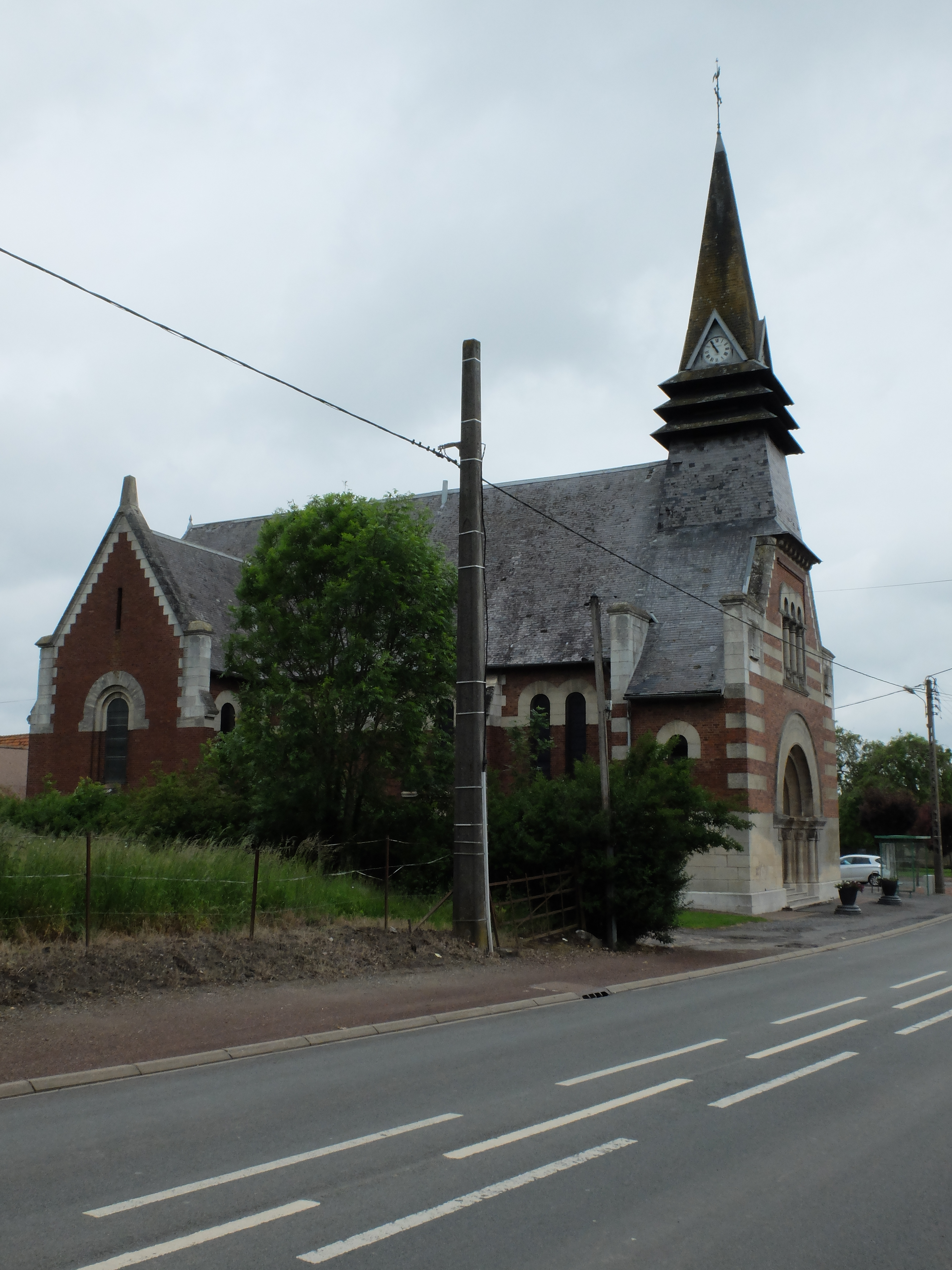 Vue de l'église Saint-Léger d'Hendecourt-lès-Cagnicourt.